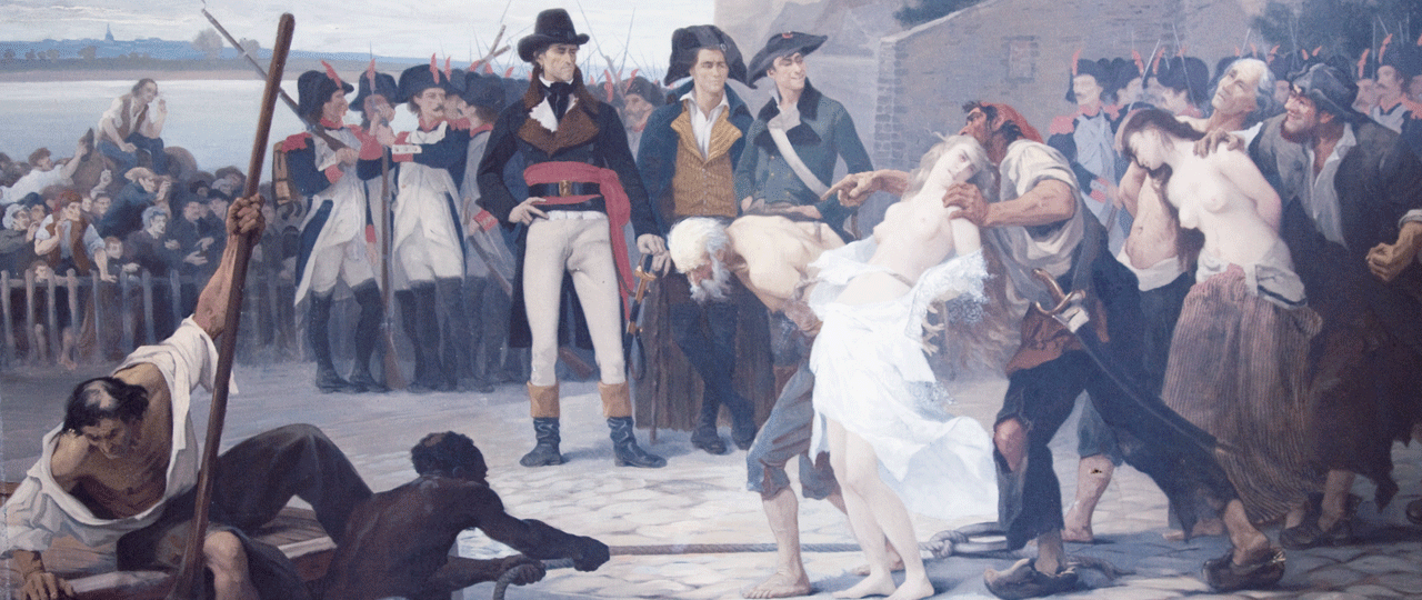 Les Noyades de Nantes en 1793""